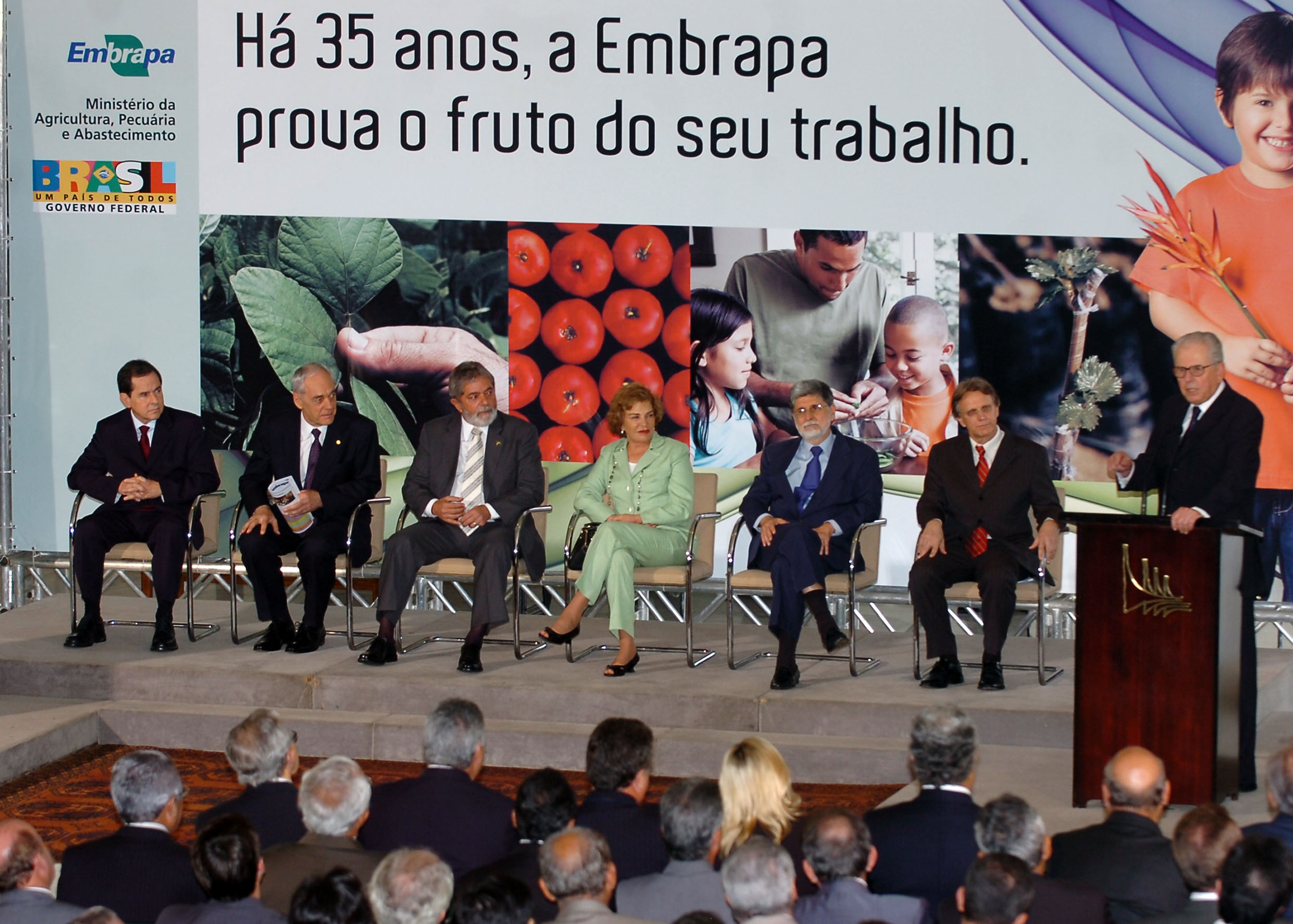 Comemoração dos 35 anos de fundação da Embrapa, no Palácio do Planalto - Brasília, ex-Ministro Luís Fernando Cirne Lima - fundador da entidade